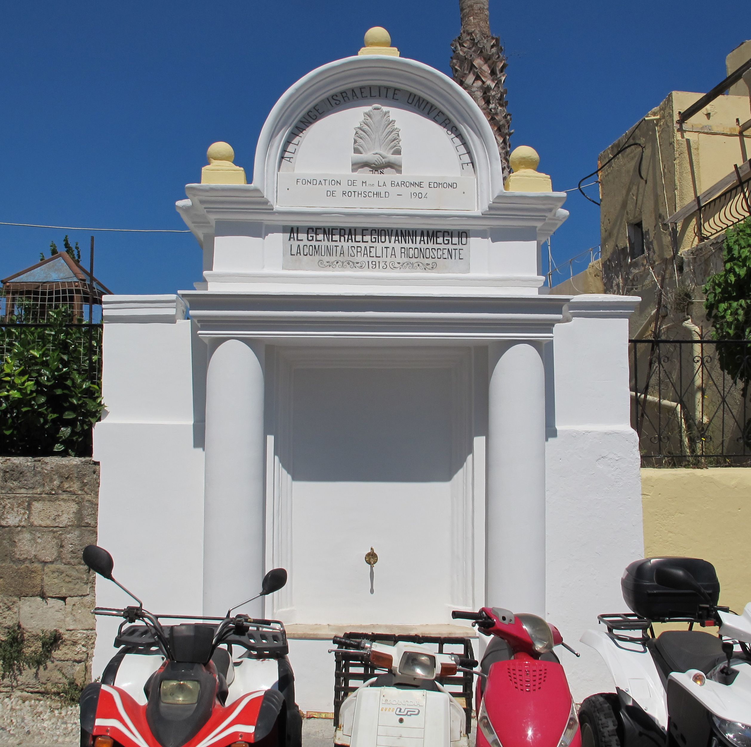 Rodi, monumento al generale giovanni ameglio, 1913, su kisthiniuo